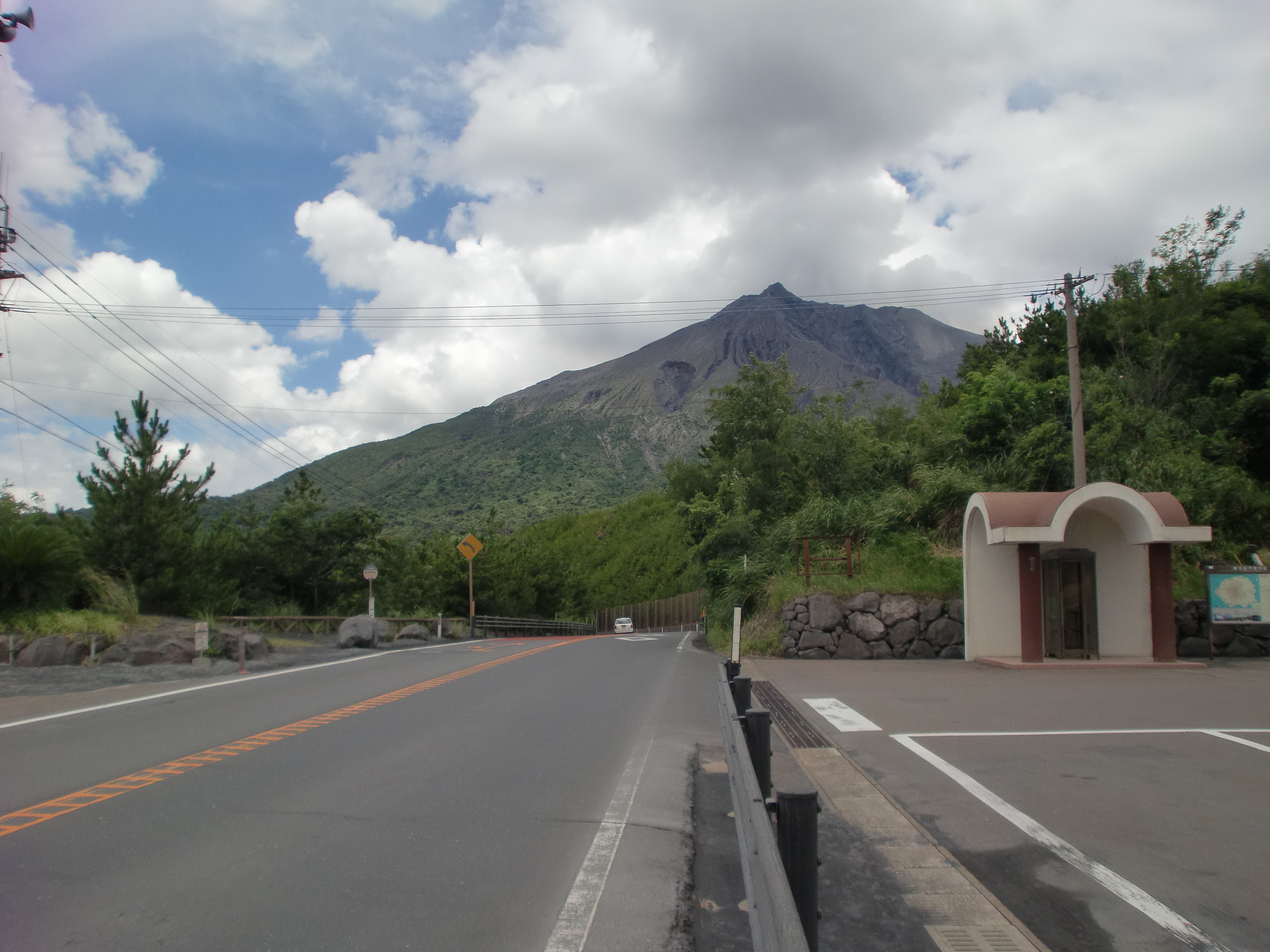 国道224号を有村溶岩展望所の駐車場から桜島港方面に望む。